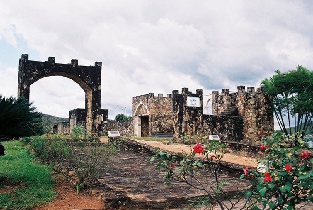 Monte das Oliveiras, Alpinópolis, Minas Gerais, Brasil